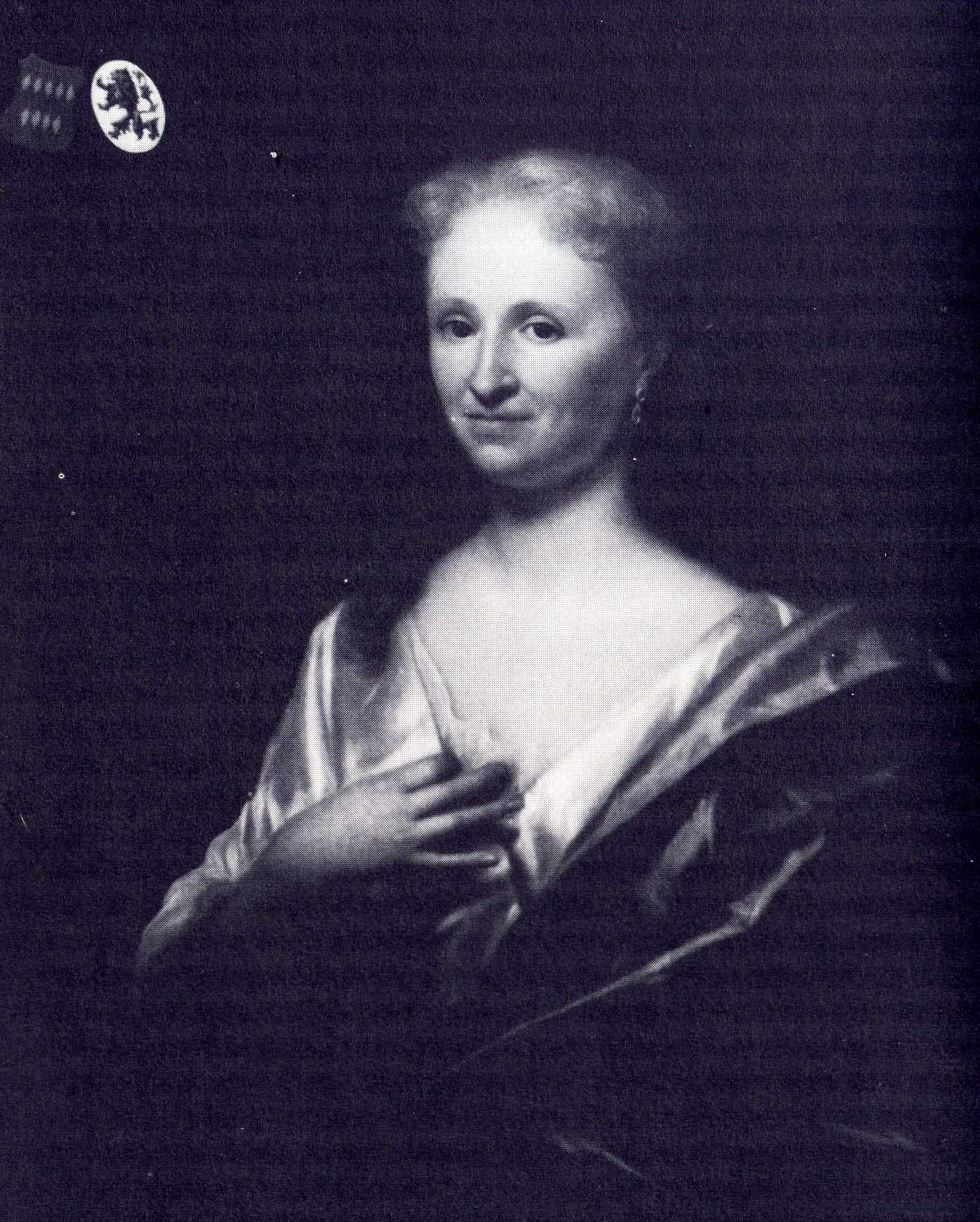 Portret van Catharina de Grande (1688-1744), echtgenote van de Goudse regent Adriaan van der Does (1686-1749)